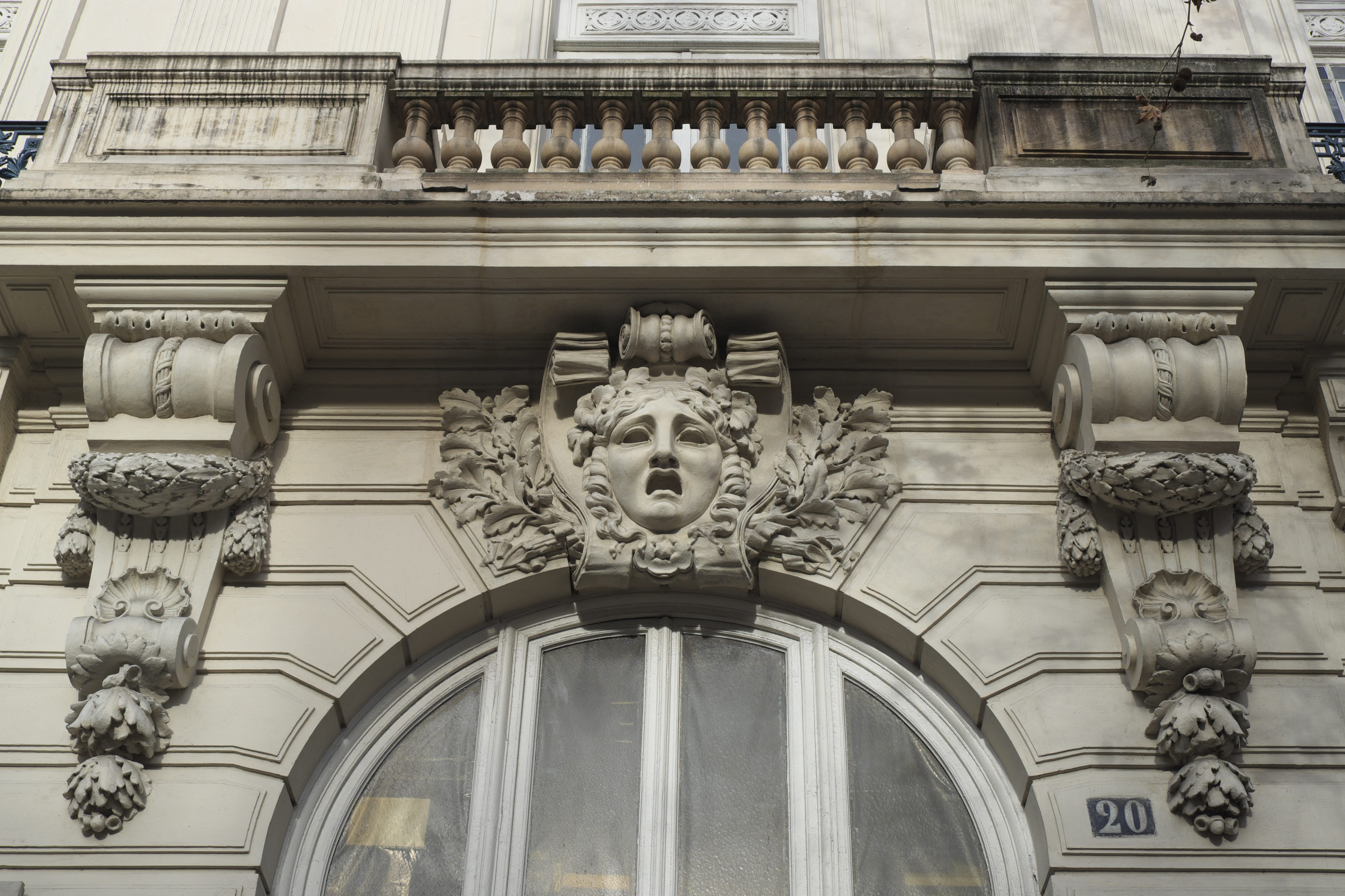 Théâtre de la Renaissance im 10. Arrondissement in Paris (Île-de-France/Frankreich)